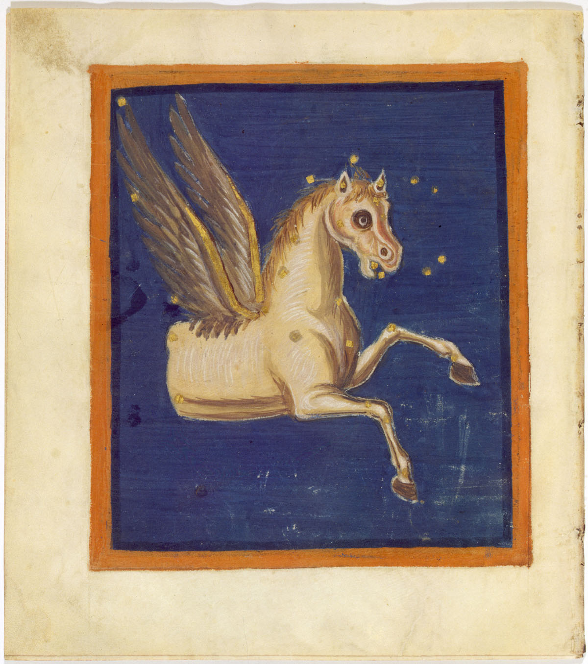 Fol. 32v Pegasus